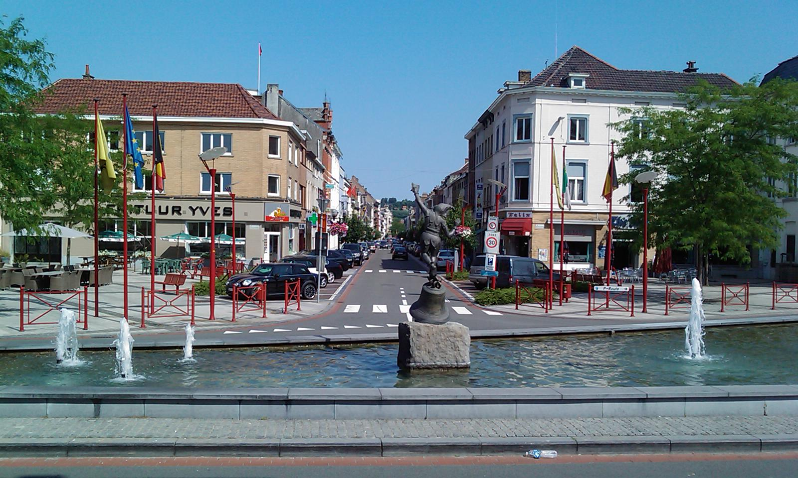 Renaix centre ville. Ronse centrum